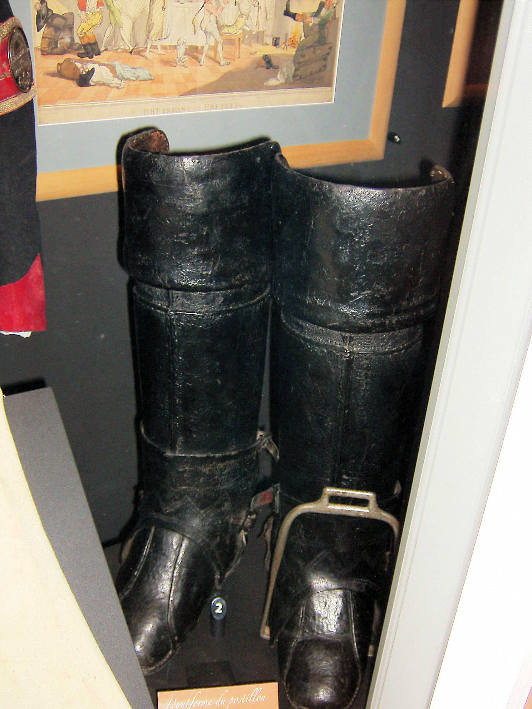 Bottes du postillon